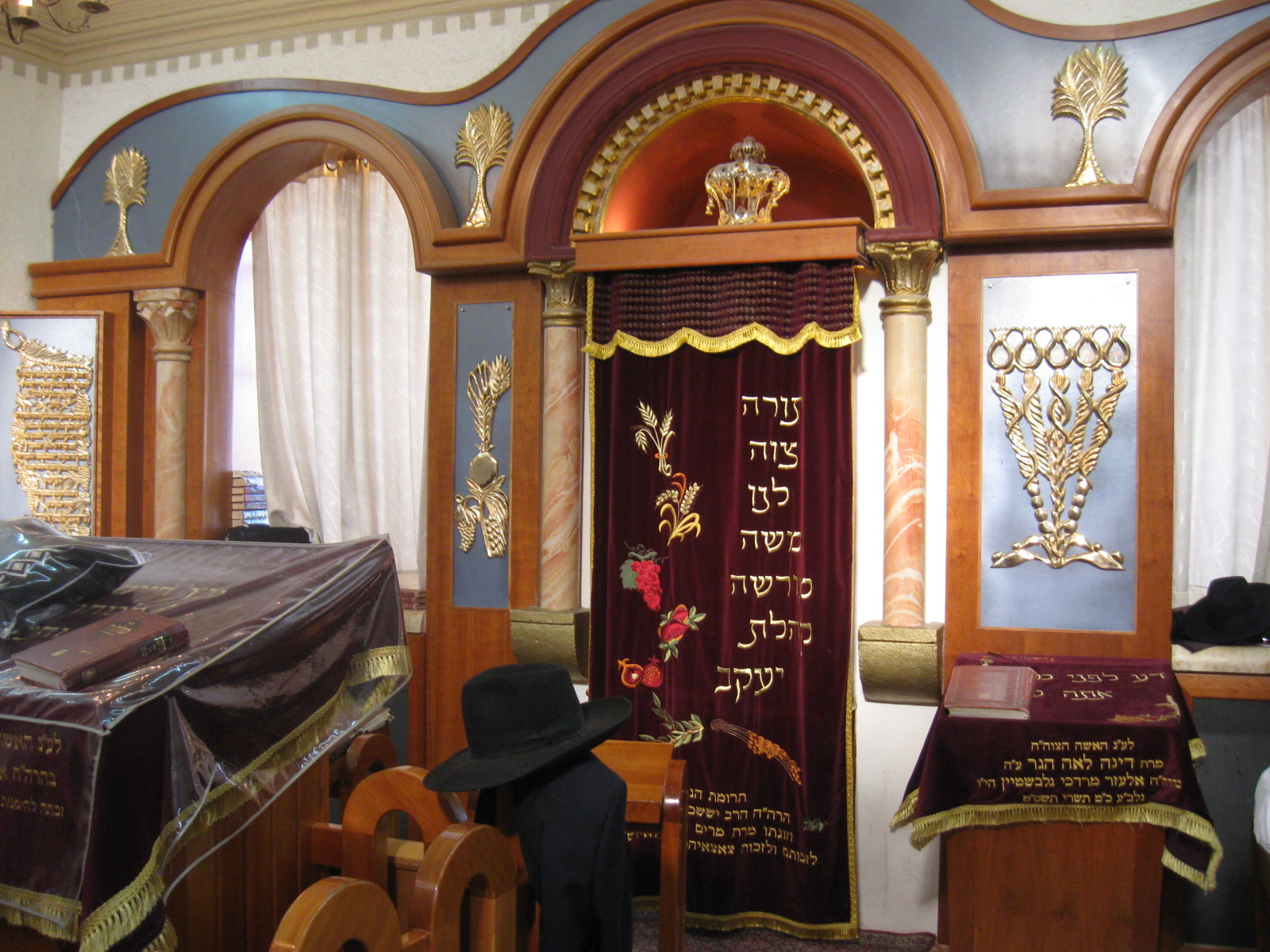 בית הכנסת צמח דוד רישיון נוצר על ידי משתמש:Daniel Ventura